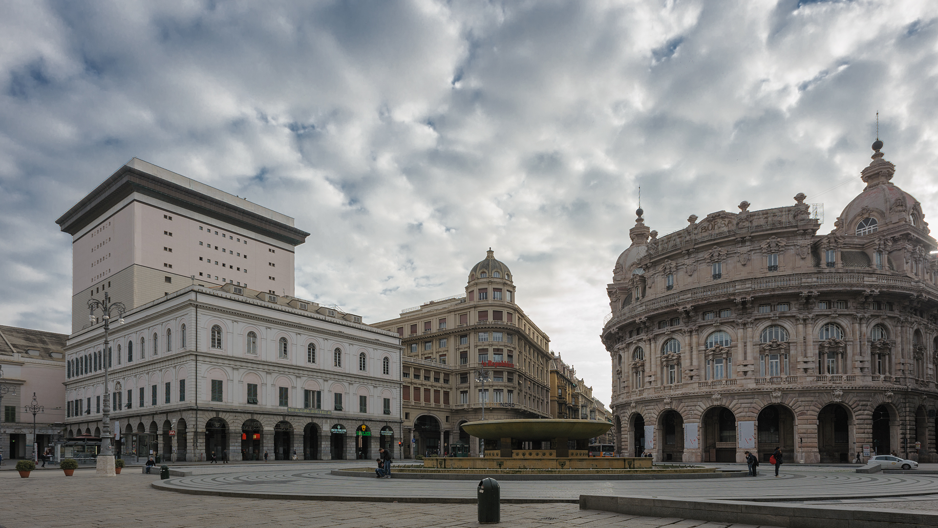 Teatro Carlo Felice This is a photo of a monument which is part of cultural heritage of Italy.